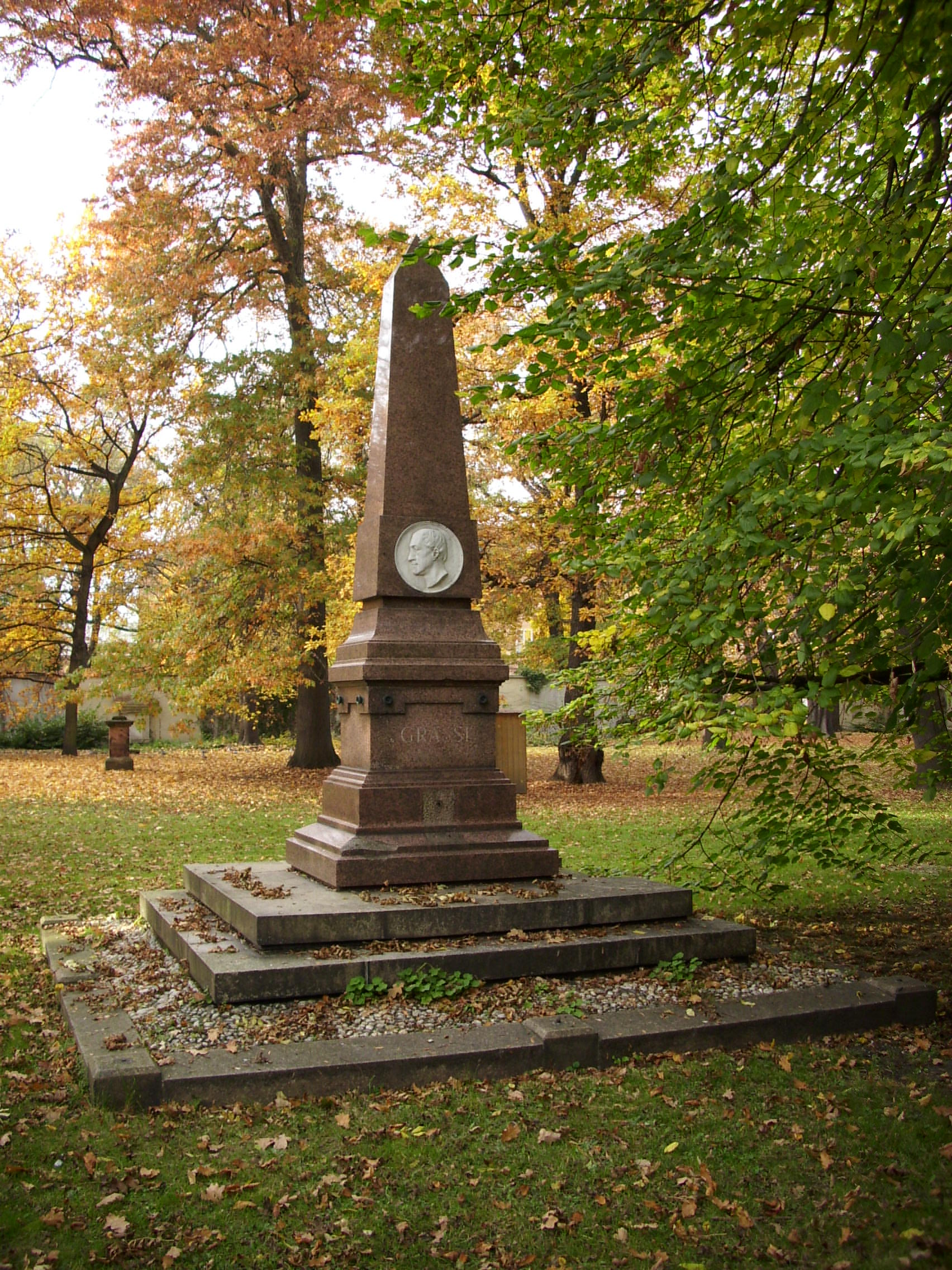 Grabmal Franz Dominic Grassi, Alter Johannisfriedhof Leipzig